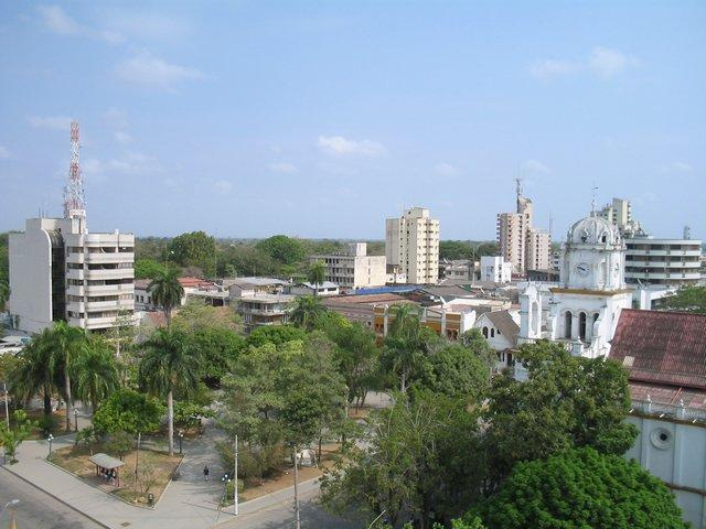 Vista panorámica de la ciudad de Montería.